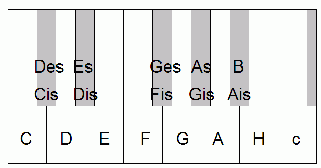 12-stufige gleichstufige Tastatur, bei der Cis und Des etc. "verwechselt werden können"